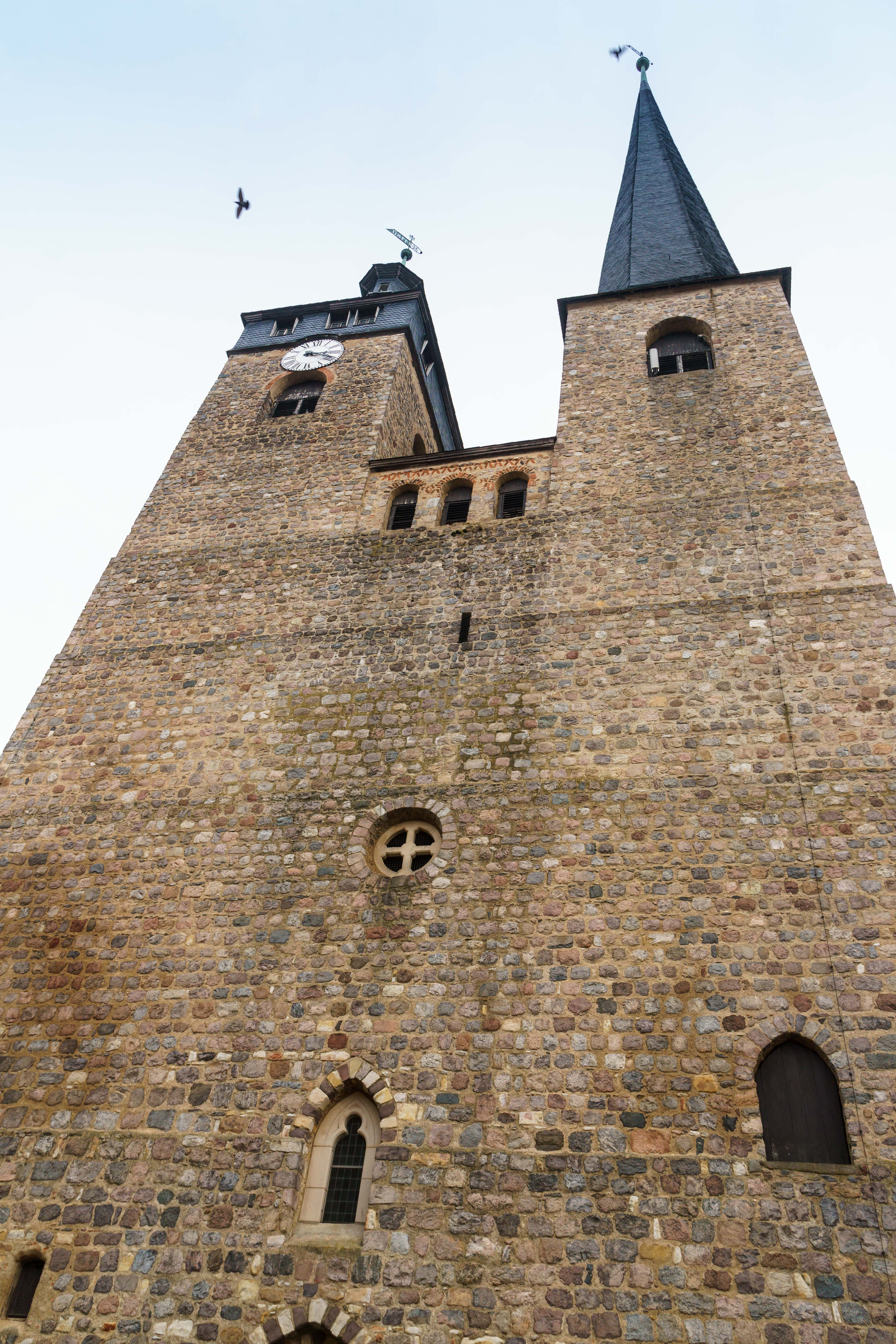 Kirche Unser Lieben Frauen, sogenannte Oberkirche in Burg (bei Magdeburg)